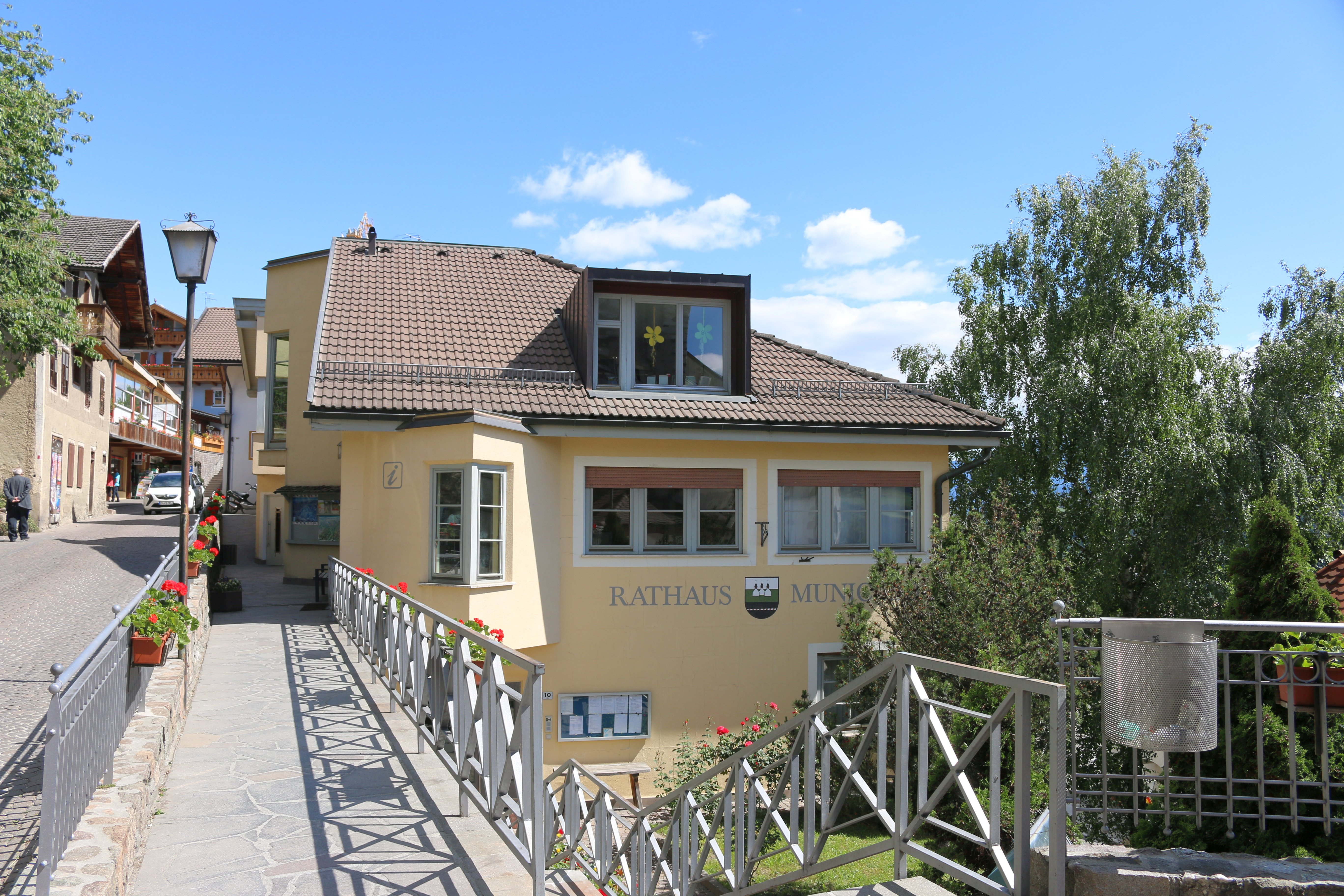 Barbian, Südtirol: Rathaus